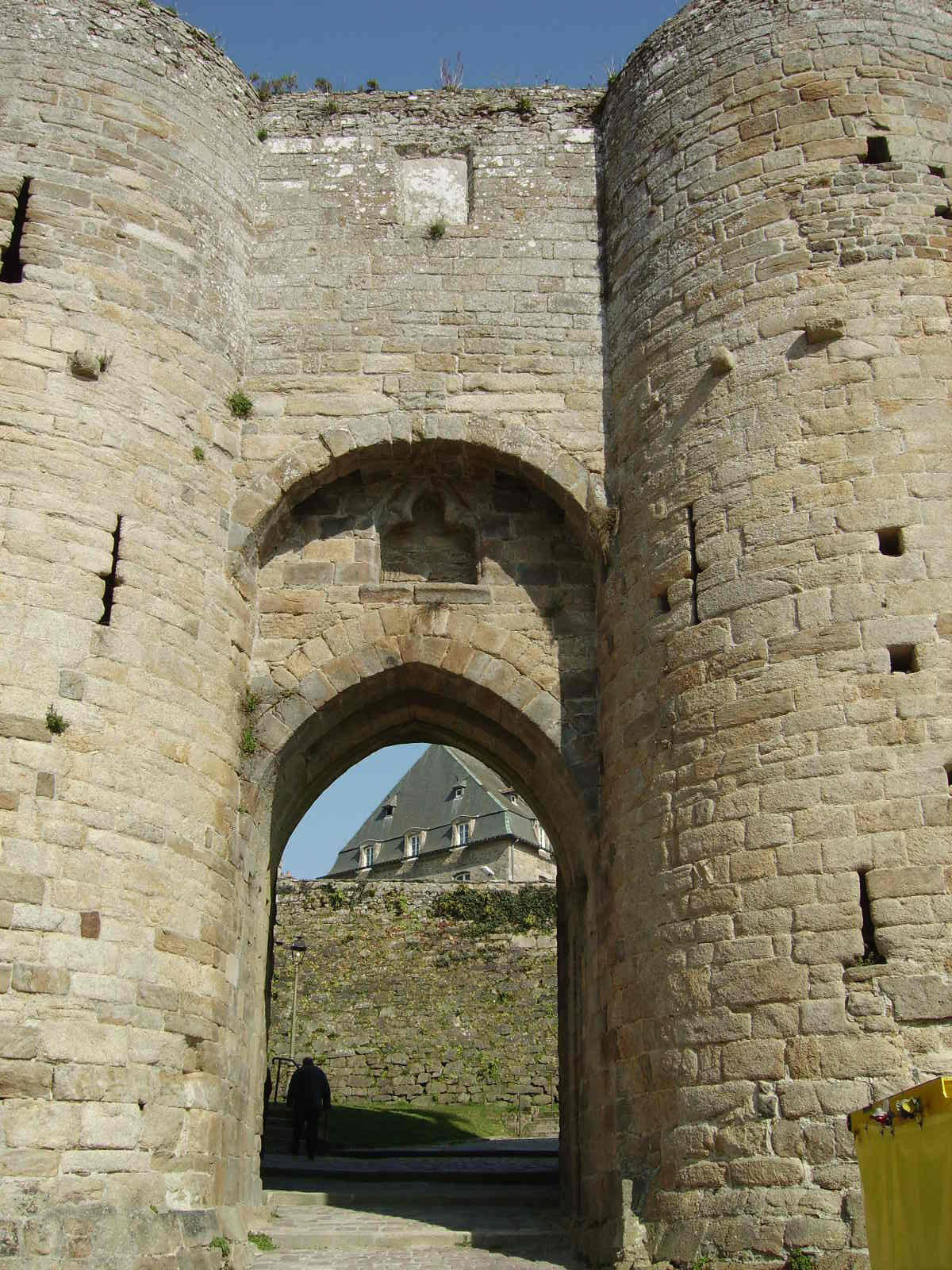 Pordo de Giĉeto en Dinan (Bretonio)